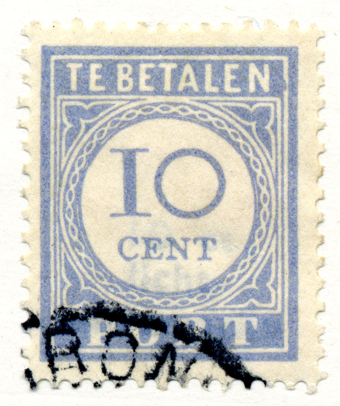 1912-1921 Portzegel Nederland 10 cent